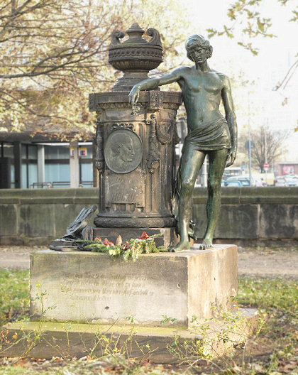 Zur Erinnerung an den Dichter Ludwig Christoph Heinrich Hölty auf dem St. Nikolai-Friedhof (1901) von Otto Lüer und Karl Gundelach, Porträt-Medaillon von Friedrich Adolf Sötebier aus dem Jahr 1961. Bronzefigur eines Jünglings, an einem Steinsockel mit dem Porträt lehnend. Die genaue Lage des Grabes auf dem Friedhof ist übrigens unbekannt. Die Gedenkverse stammen von Nikolaus Lenau: "Hölty, Dein Freund der Frühling ist gekommen. Klagend irrt er im Hause, Dich zu finden. Doch umsonst, sein klagender Ruf verhallt in einsamen Schatten."